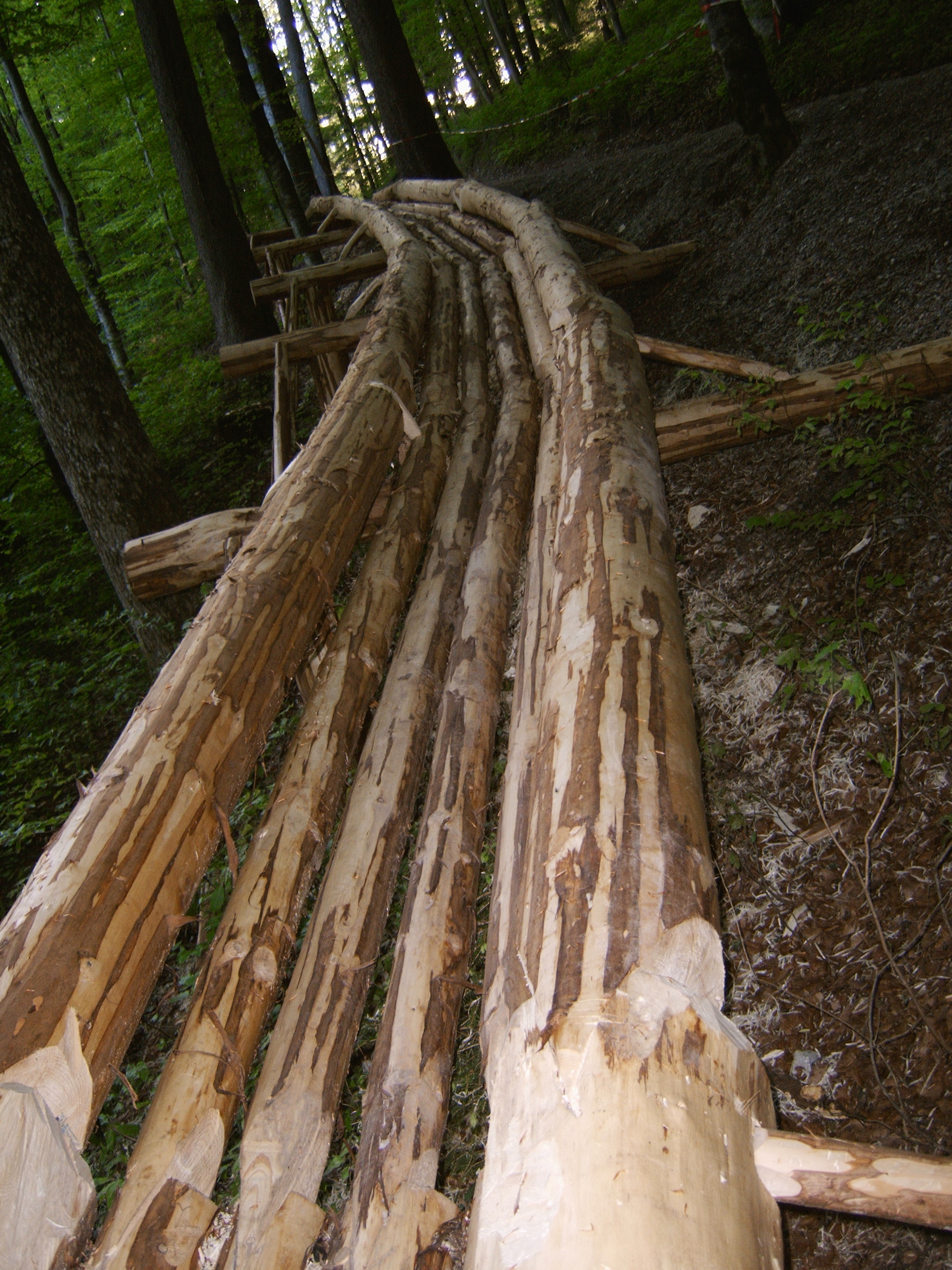 Holzriese